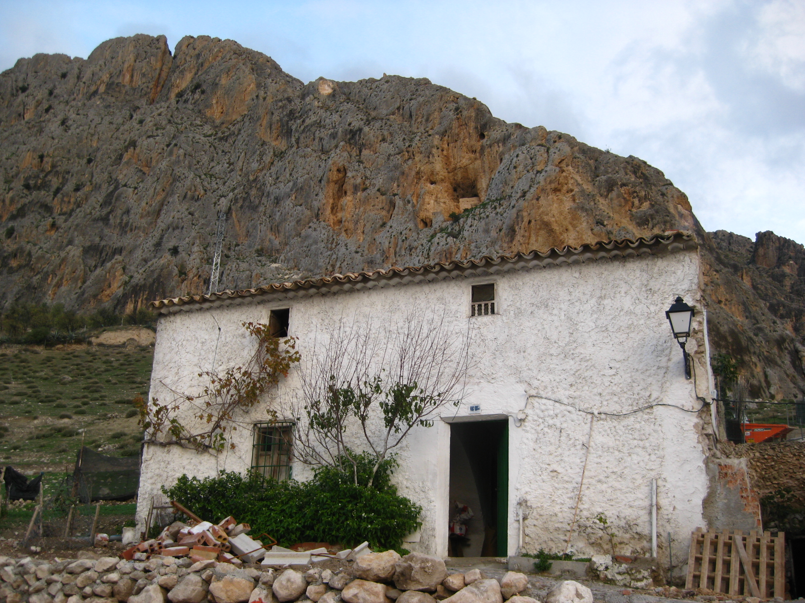 Casa peculiar y la sierra al fondo